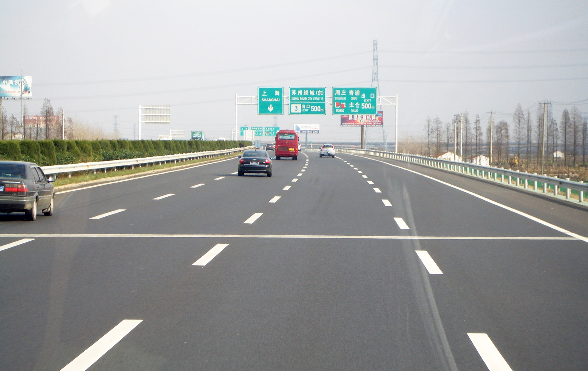 沪宁高速苏州段 本人摄制 2006.01.23 Calvingao